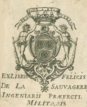 Ex-libris Félix Le Royer de La Sauvagère Anjou Famille Le Clerc, Versailles